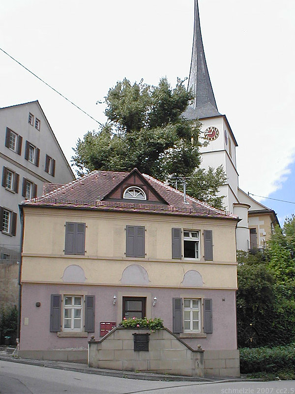 Backhaus von 1841 und evang. Kirche in Heilbronn-Biberach